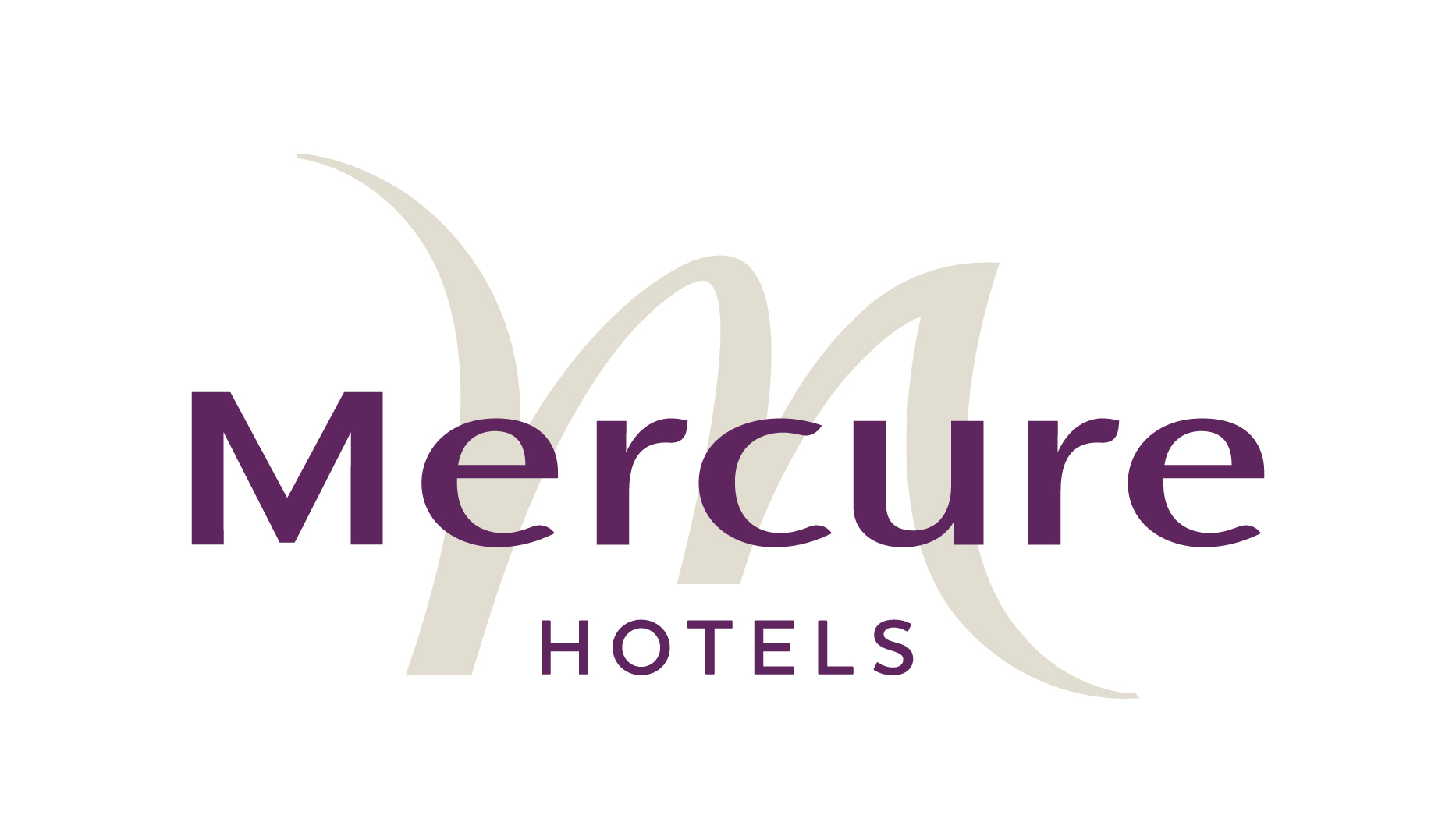 Mercure hotels logo